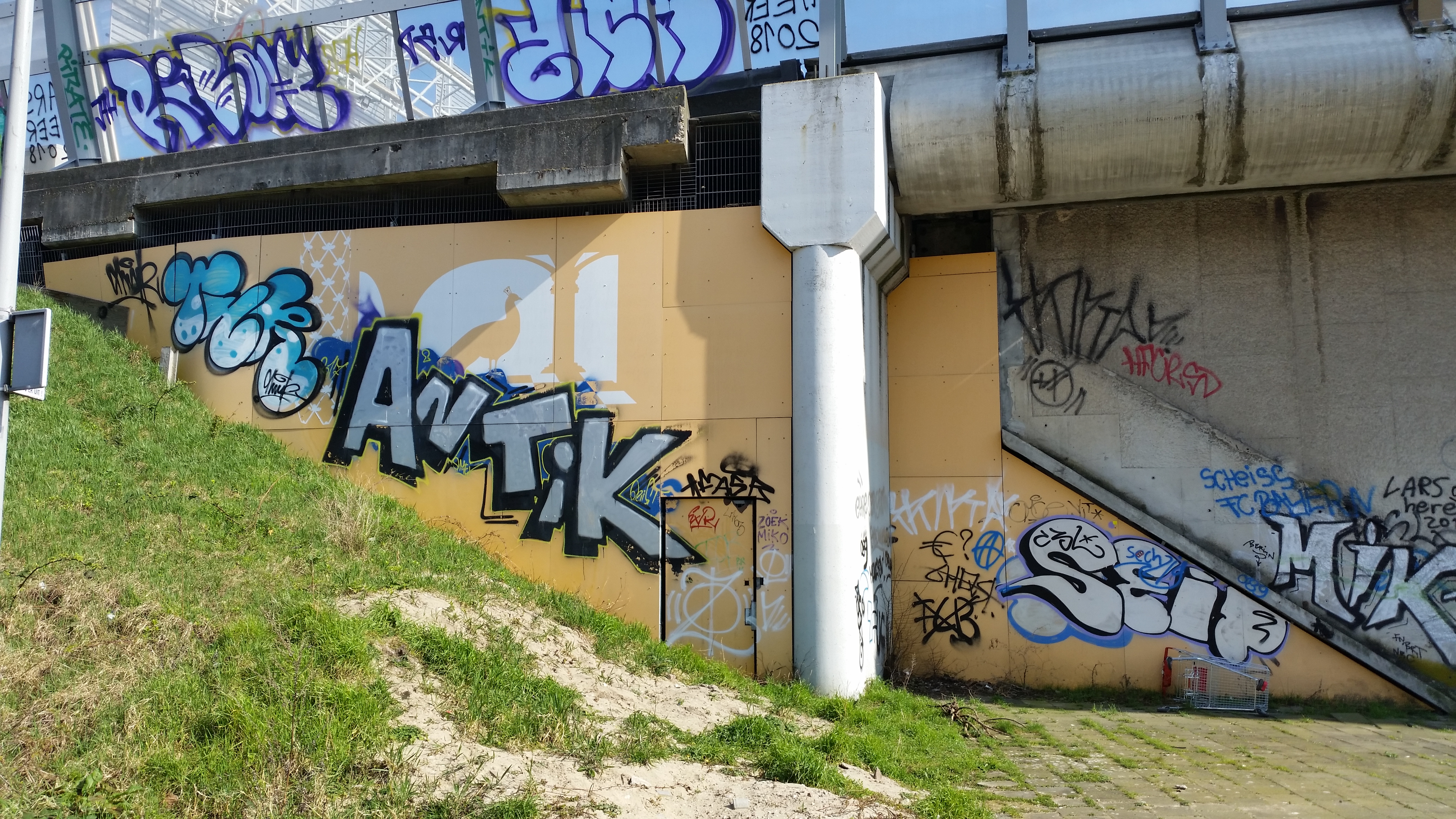 Voorburgstraatbrug is een viaduct in de Rijksweg 10 over de voorburgstraat. Het oranje/witte gedeelte is een kunstwerk van Berkman en Janssens, waarover graffiti gespoten is